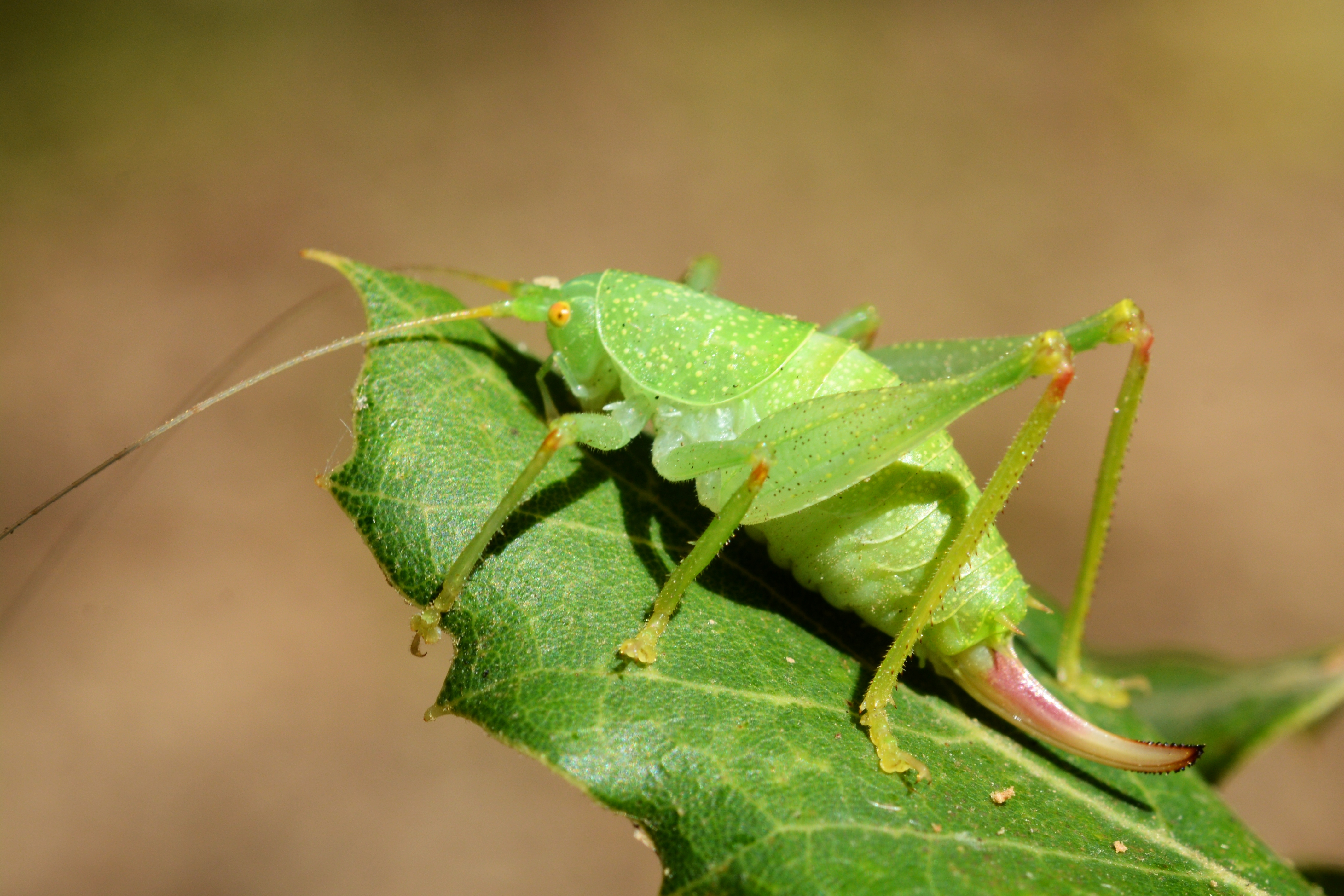 Cyrtaspis scutata female